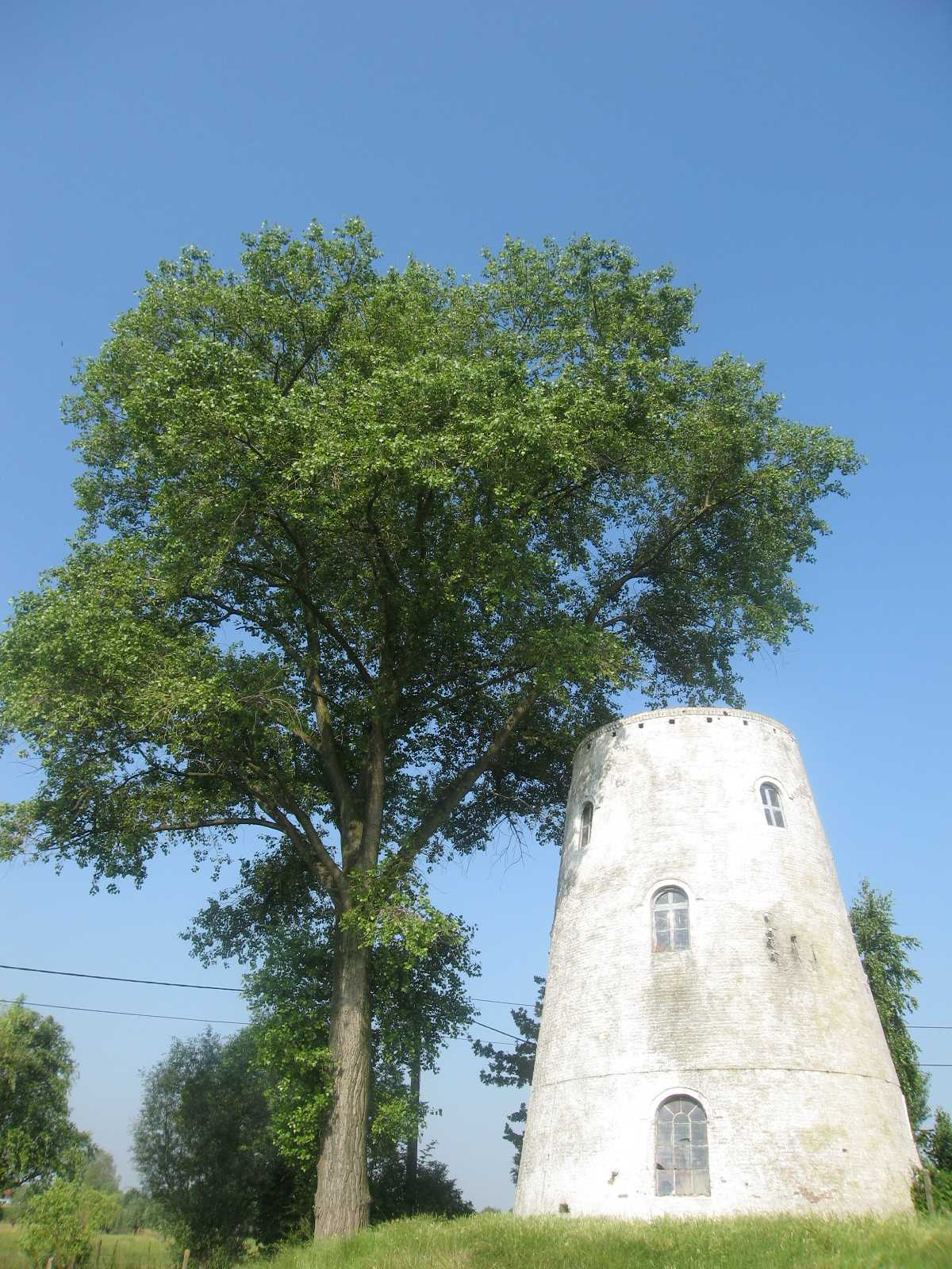 waalbosstraat 3 molen1